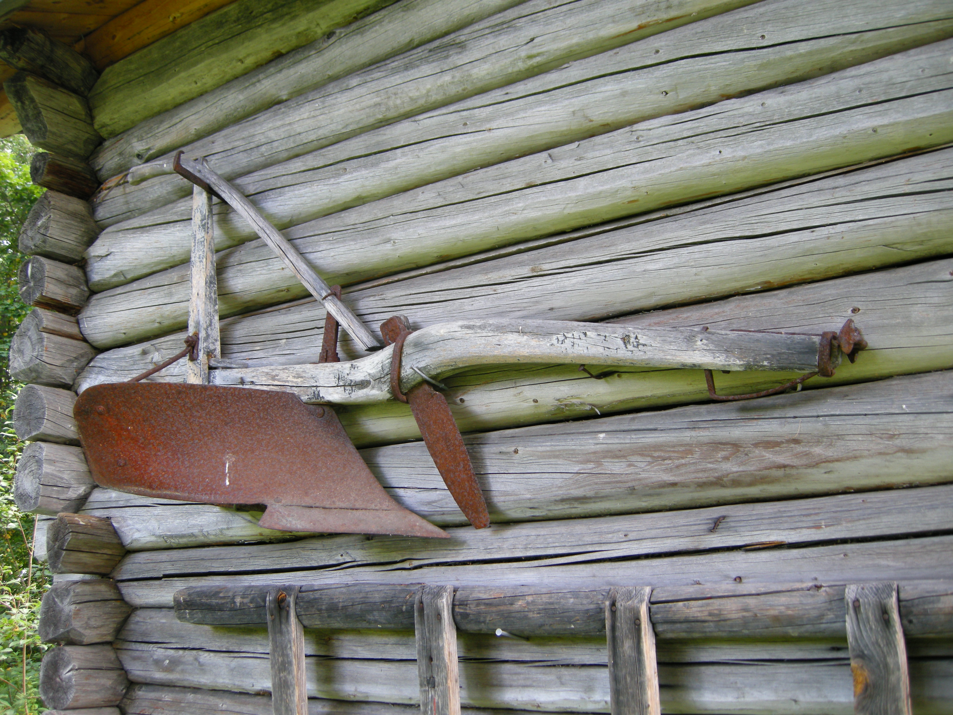 Gammel plog Rollag bygdetun